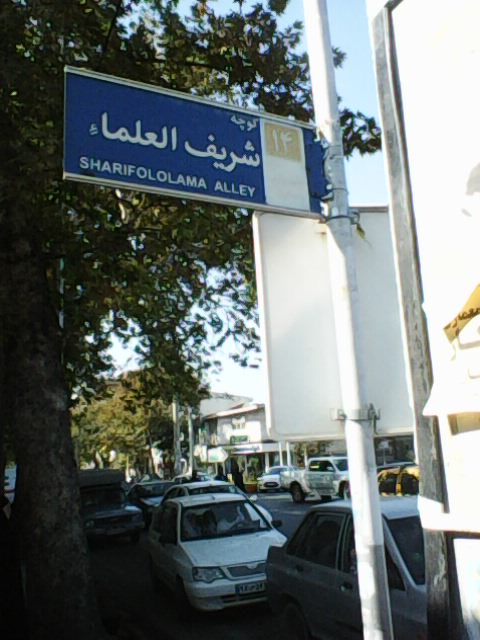 کوچه ای در بلوار امیرمازندرانی ساری بنام سید عباس شریف العلما خاوری